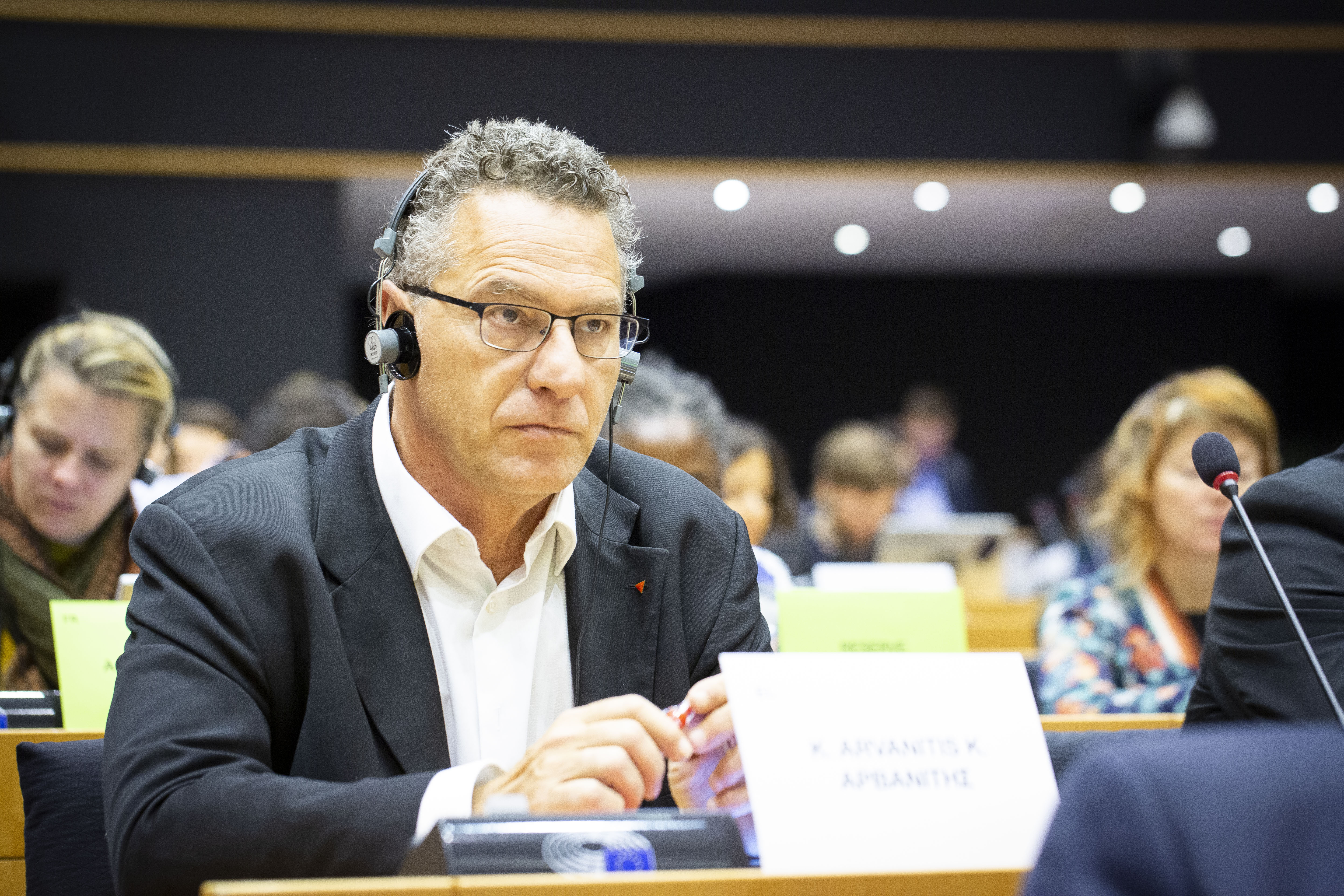 F70A8396